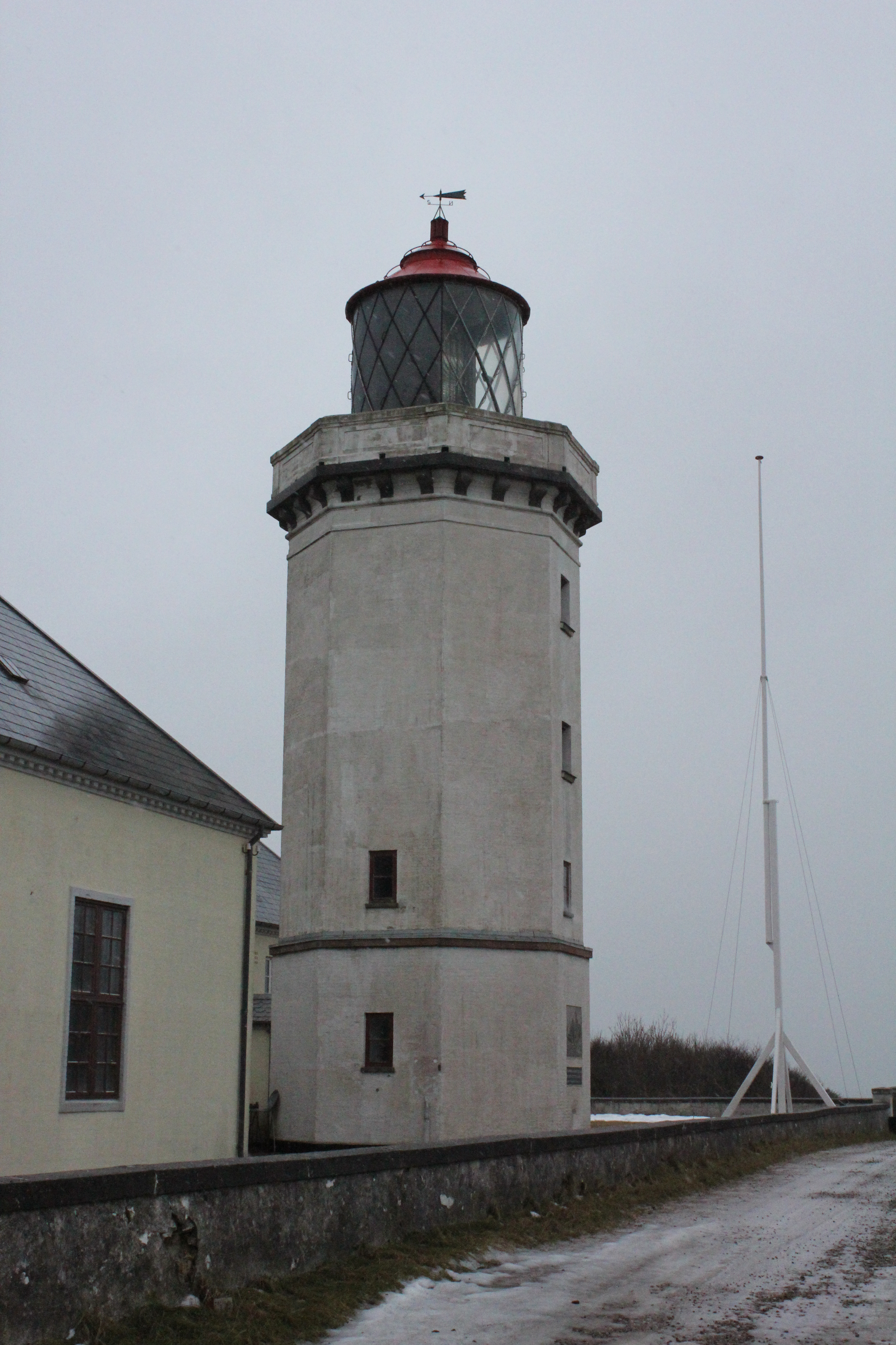 Hanstholm Fyr